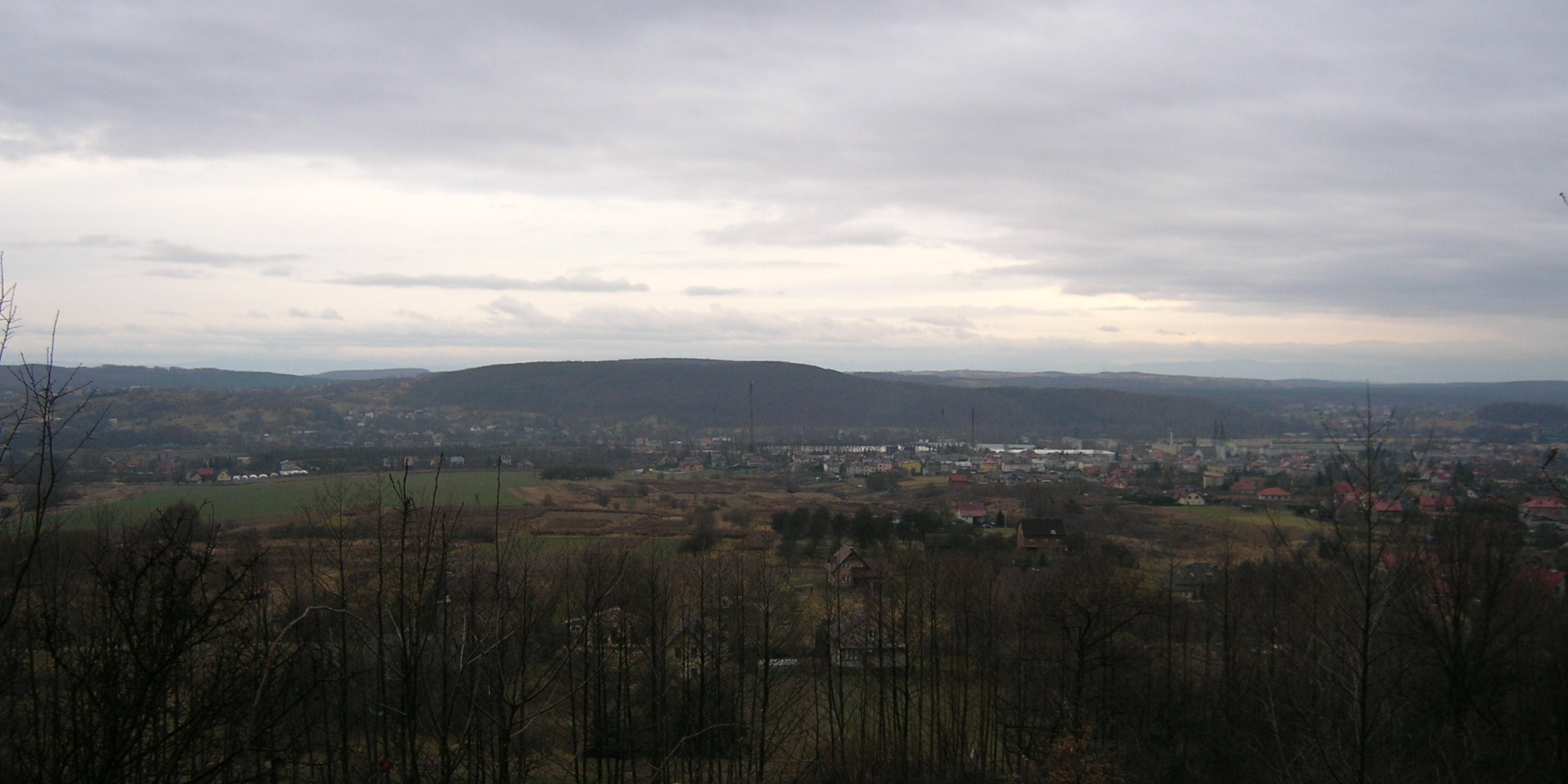 G.Porąbka.Krzeszowice.Widok od str. północnej.